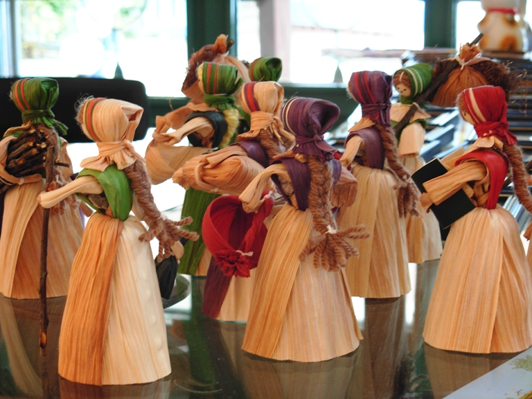 Figurice iz galerije "Babka" u Kovačici